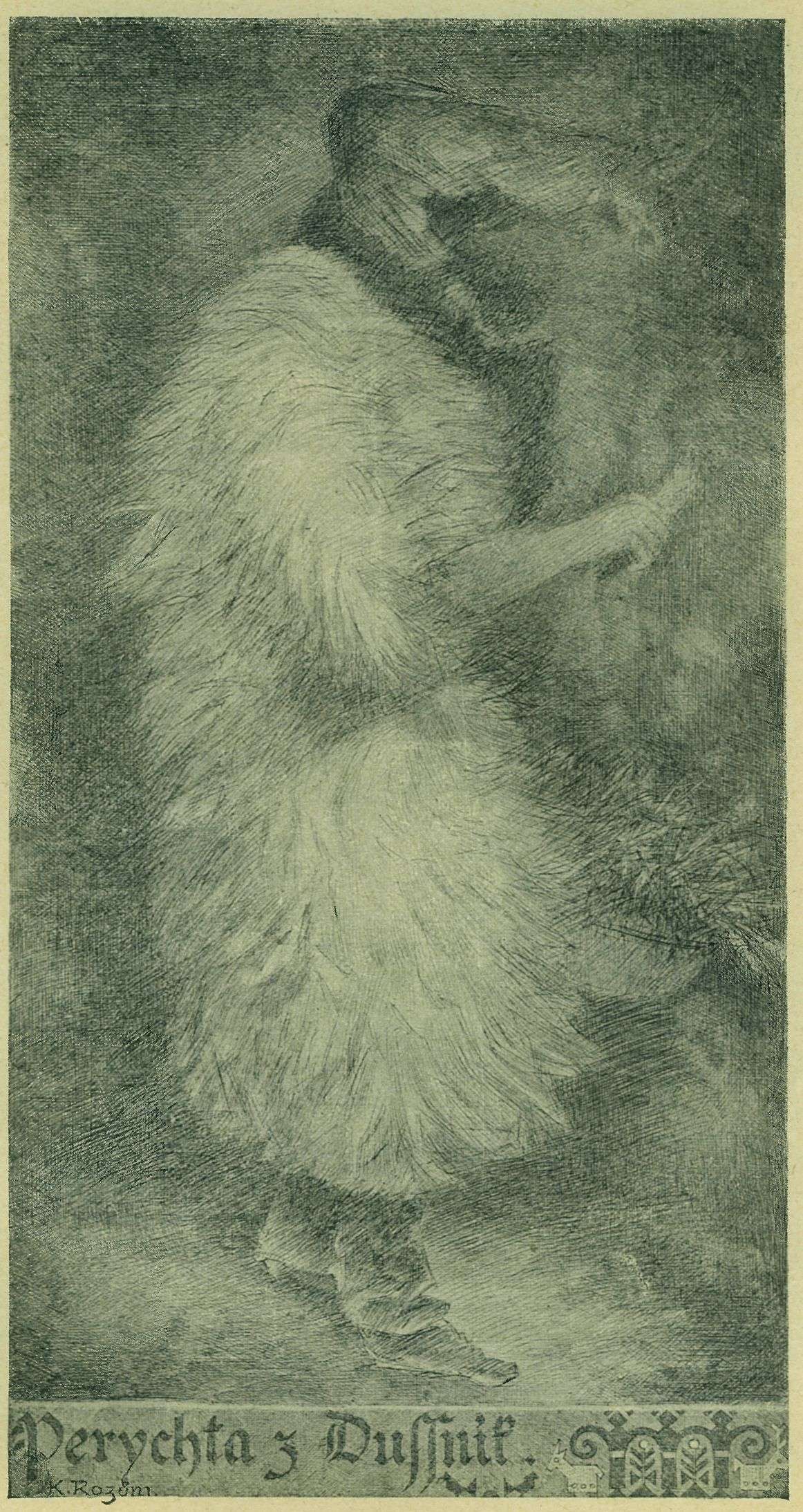 Perychta